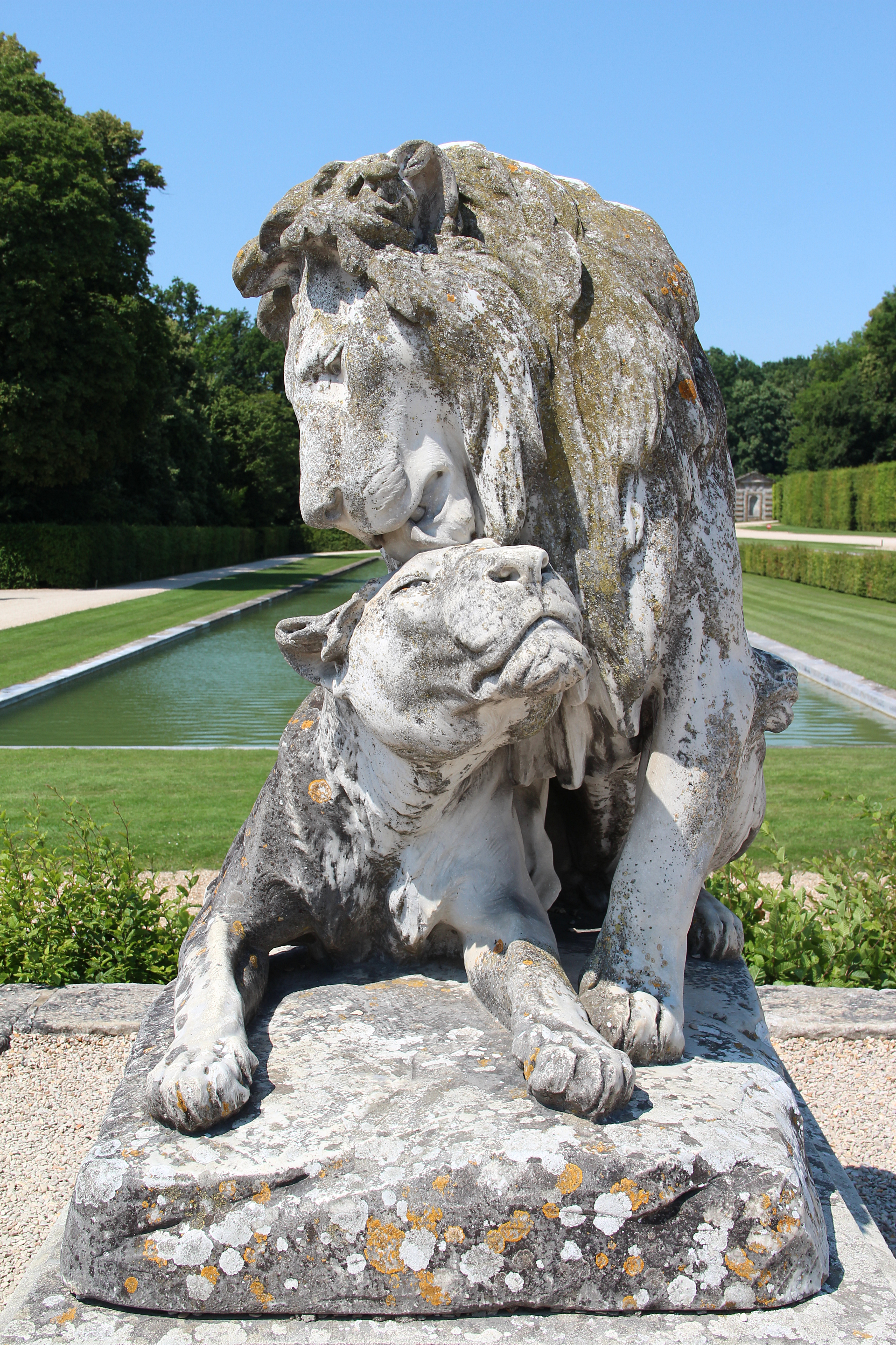 « Le Lion et la Lionne », sculpture réalisée par Georges Gardet pour orner le sommet des escaliers permettant d’accéder au second niveau de terrasse les jardins du château de Vaux-le-Vicomte - Maincy (Seine-et-Marne, France).